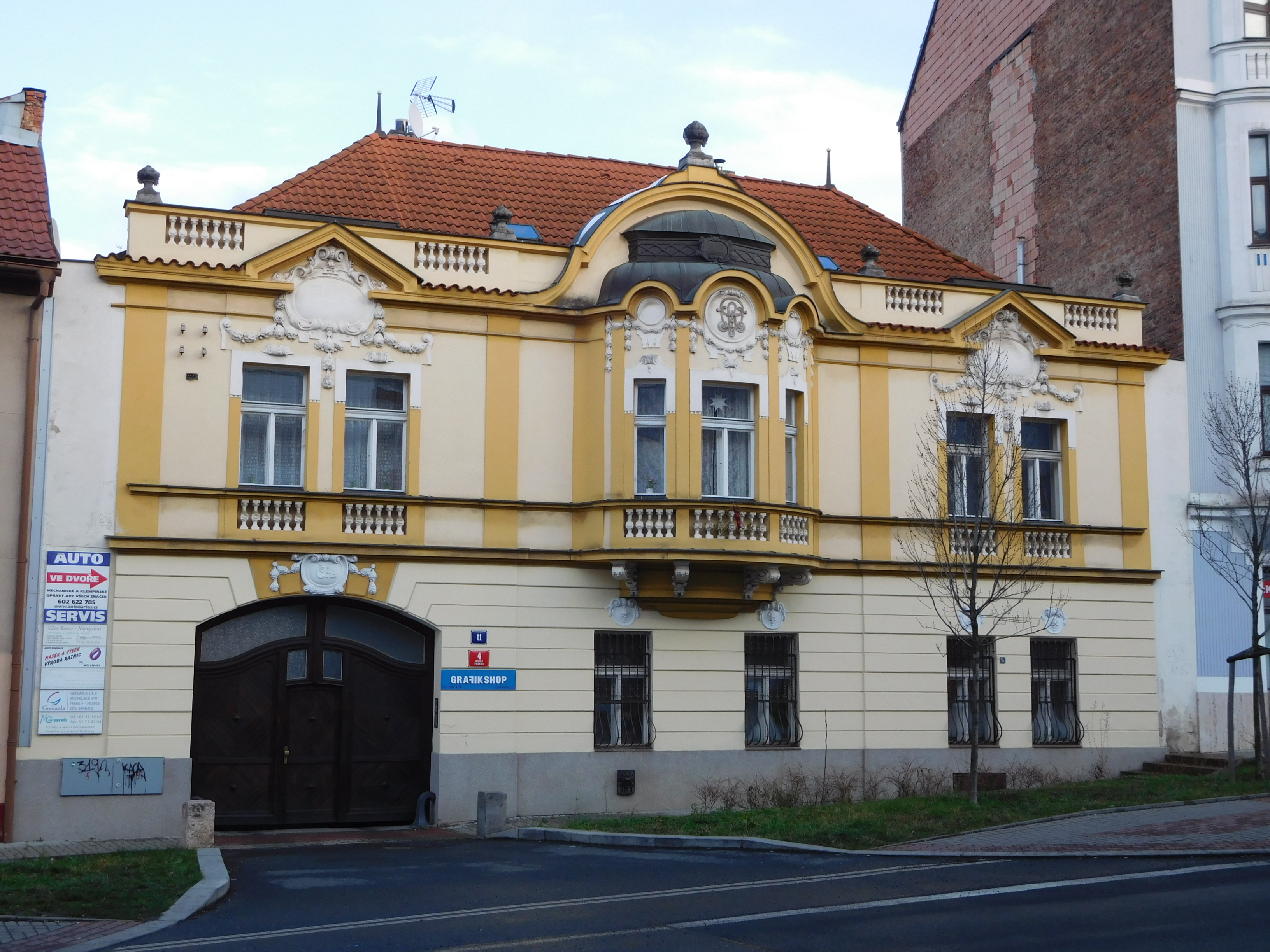 Praha - Michle - Michelská 11